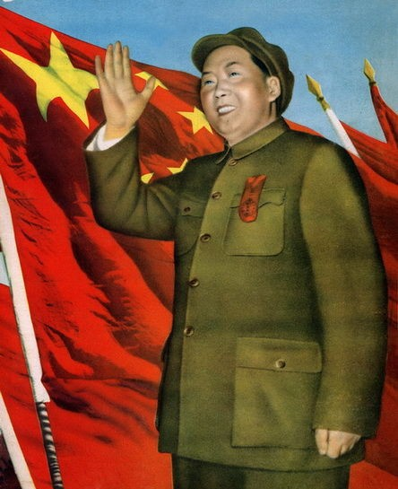 中文（中国大陆）: 1950年创刊号的封面，为毛泽东肖像。